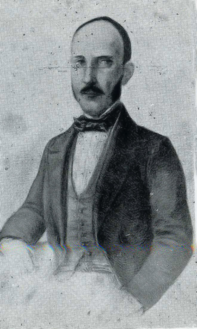 Un retrato de Quijano intercalado entre las págs. 368-369 de Vicente Ramos (1971): "Historia de la provincia de Alicante y de su capital". Alicante, Diputación Provincial. Se trata de un dibujo del XIX sin fuente de procedencia citada.